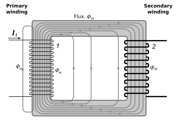 Idealised transformer showing magnetic flux that fails to link all the turns of both windings and thereby causing leakage inductance. Original work made by user "BillC"